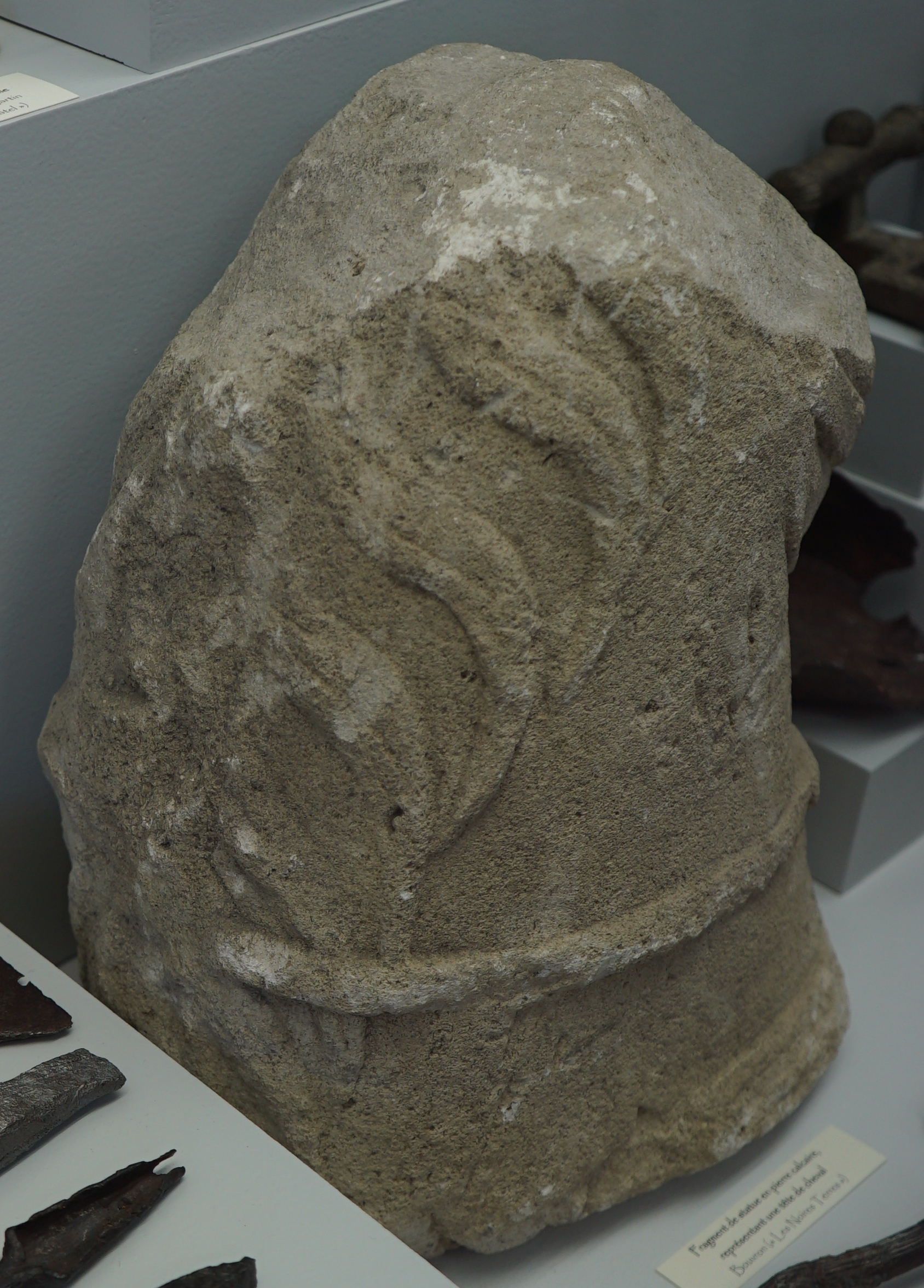 présenté au musée de Toul.